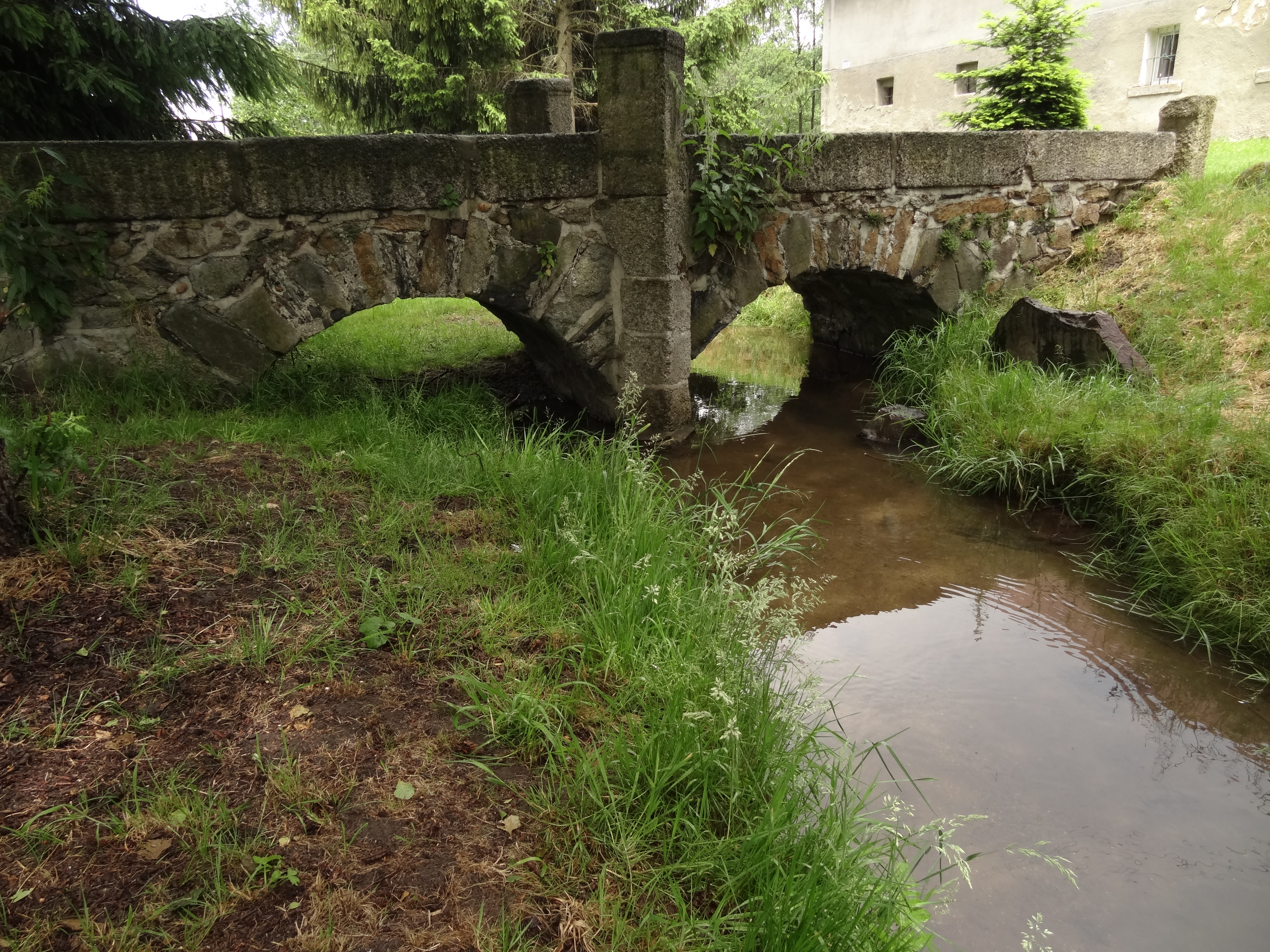 Mostek, přes Arnoltický potok, pp. 715, 718/1 a 1305, Arnoltice (Bulovka).